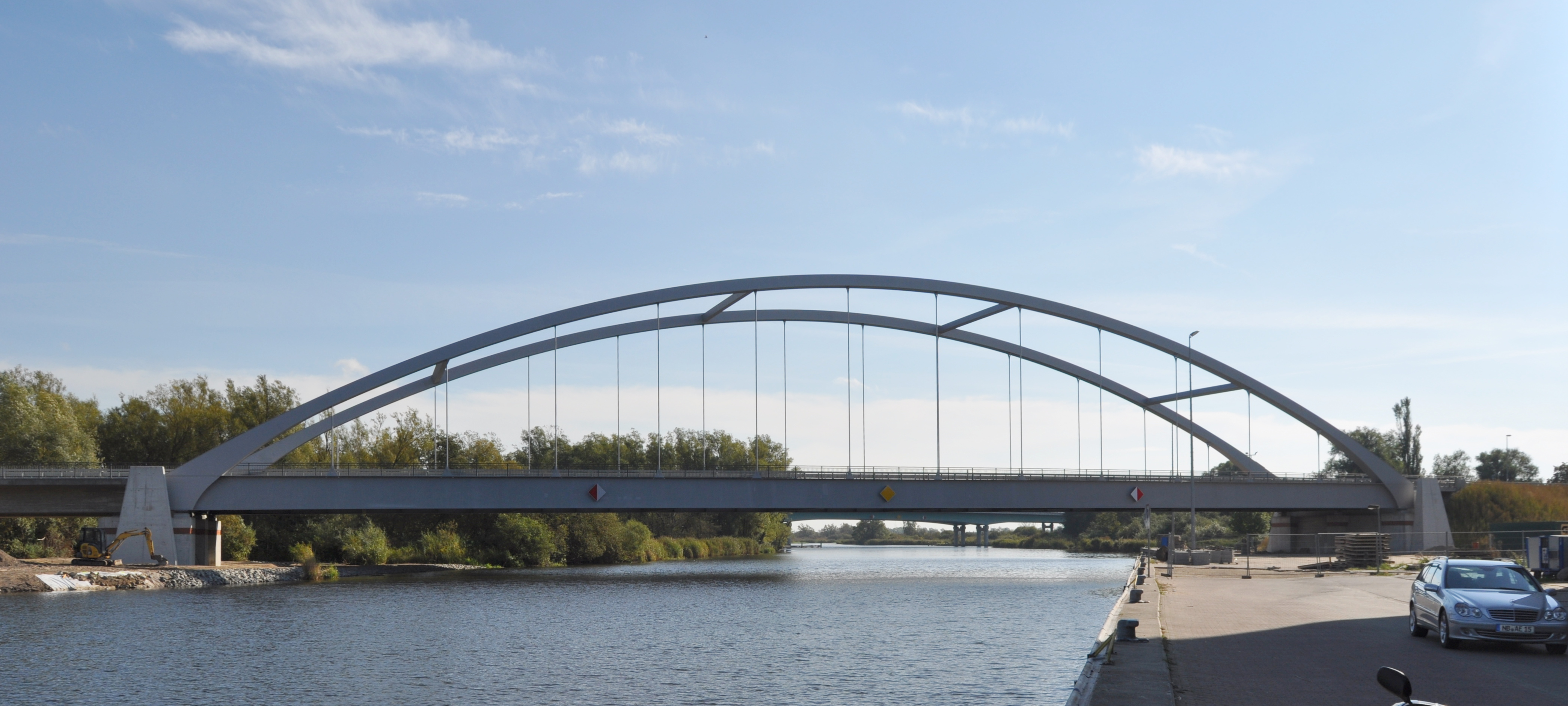 Neue Peenebrücke Jarmen